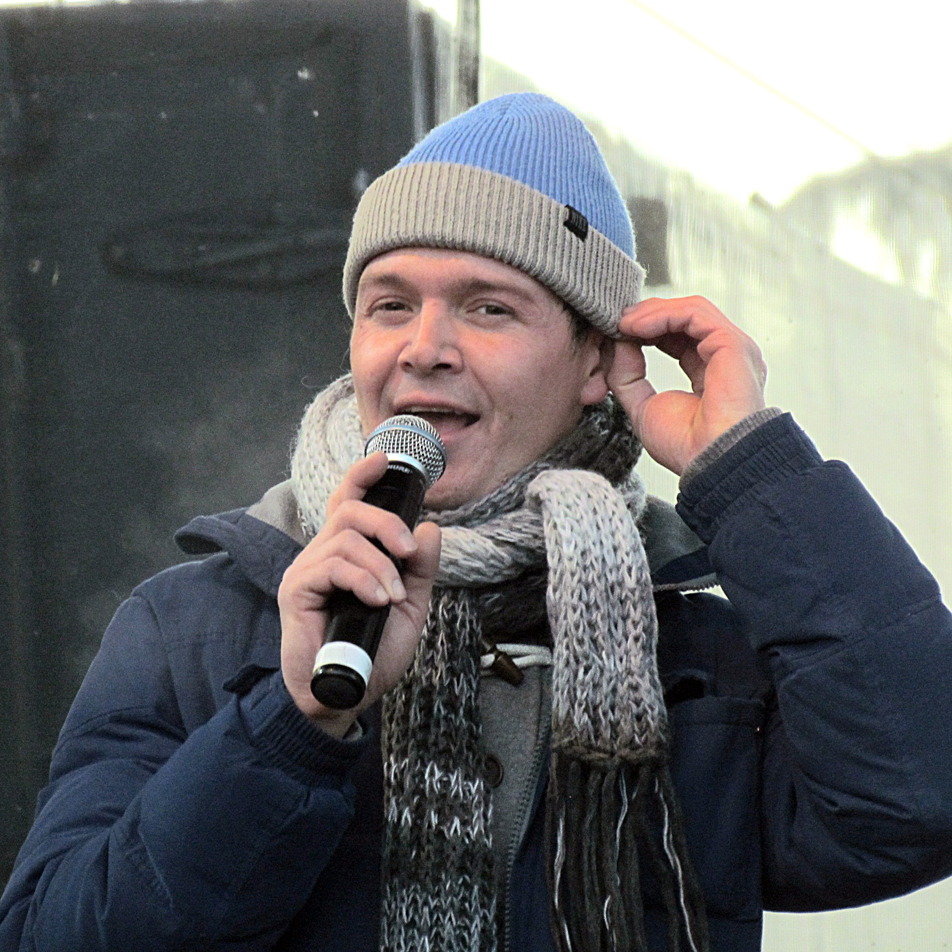 Алекса Јелић у Пожешкој "Улици отвореног срца"